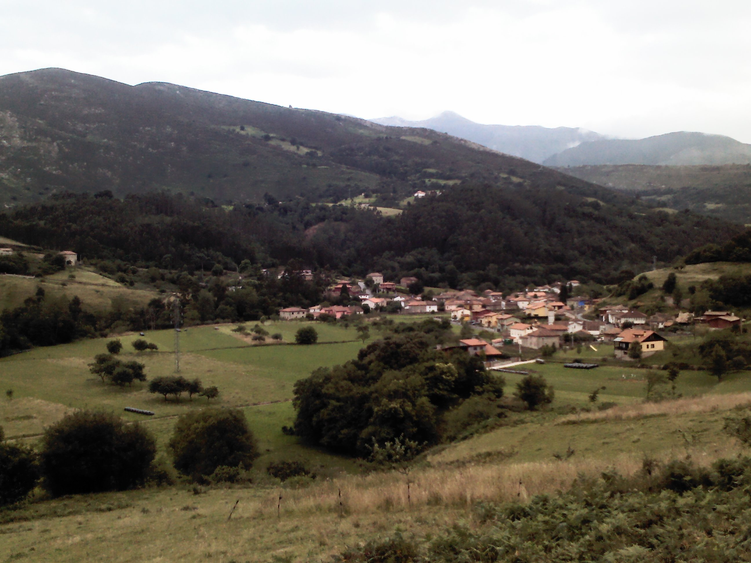 Rales se encuentra en el Valle del Río Bedón